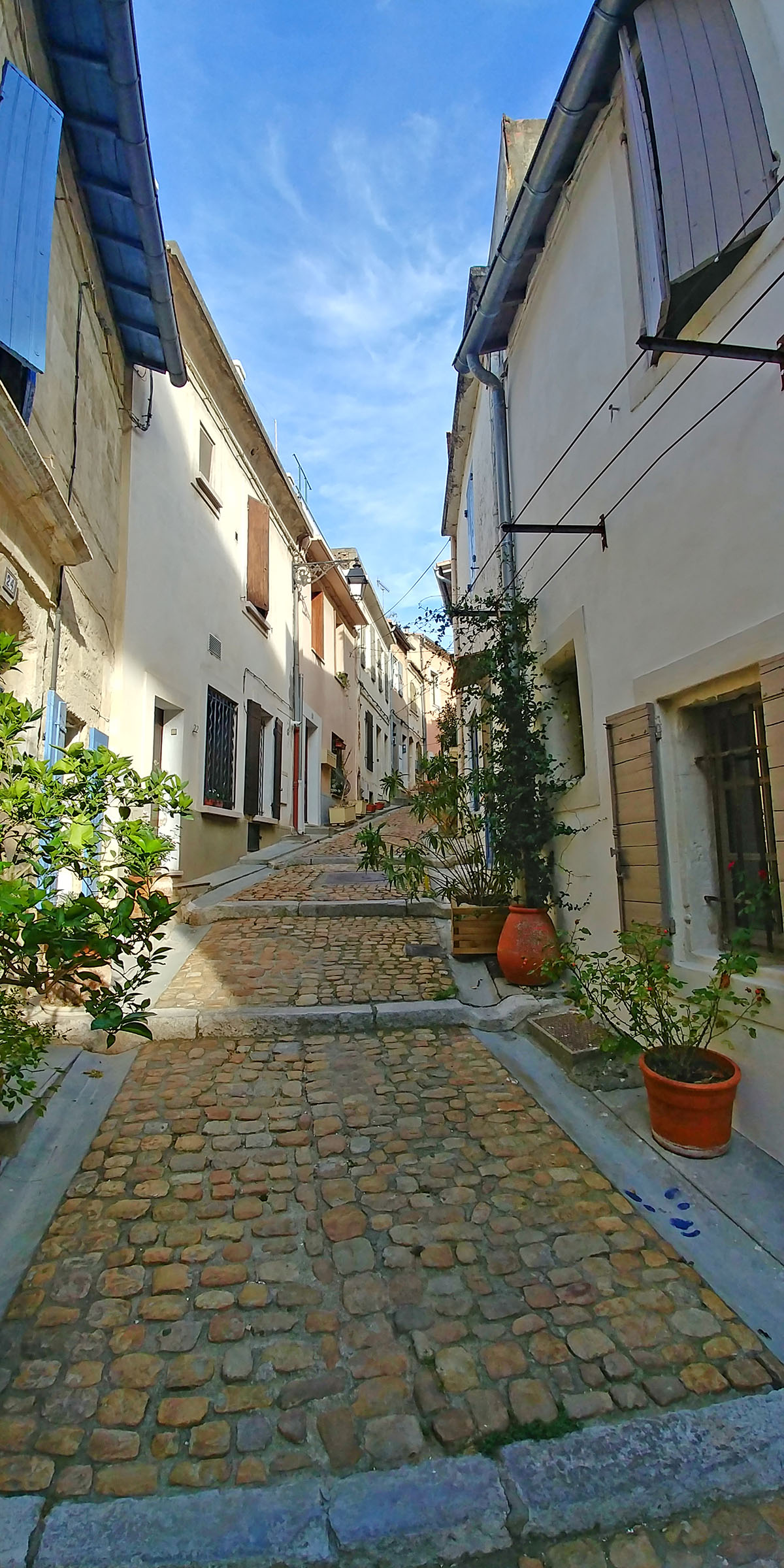 Calles de Arles